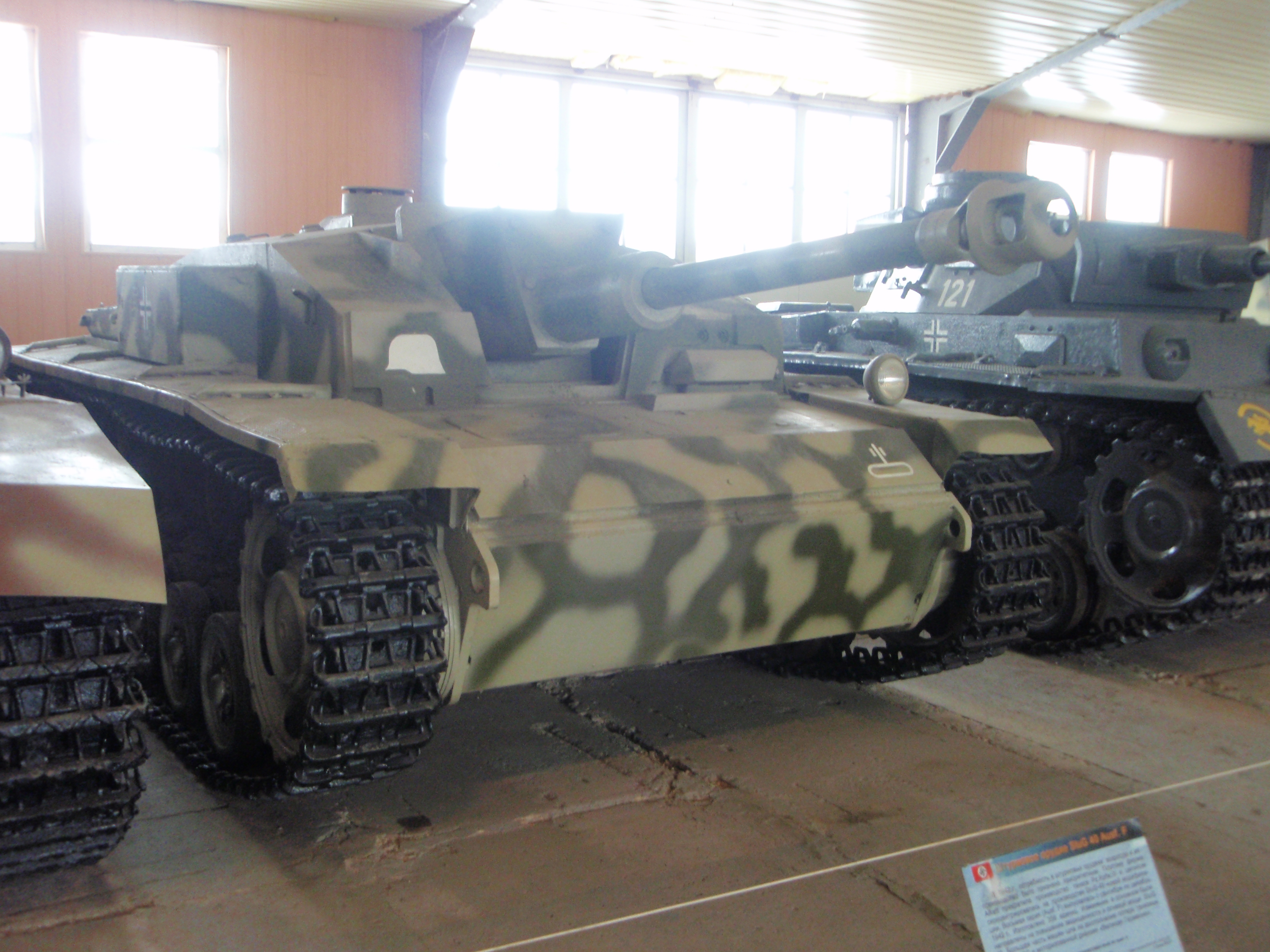 Немецкая САУ Stug 40 Ausf. F в Кубинке